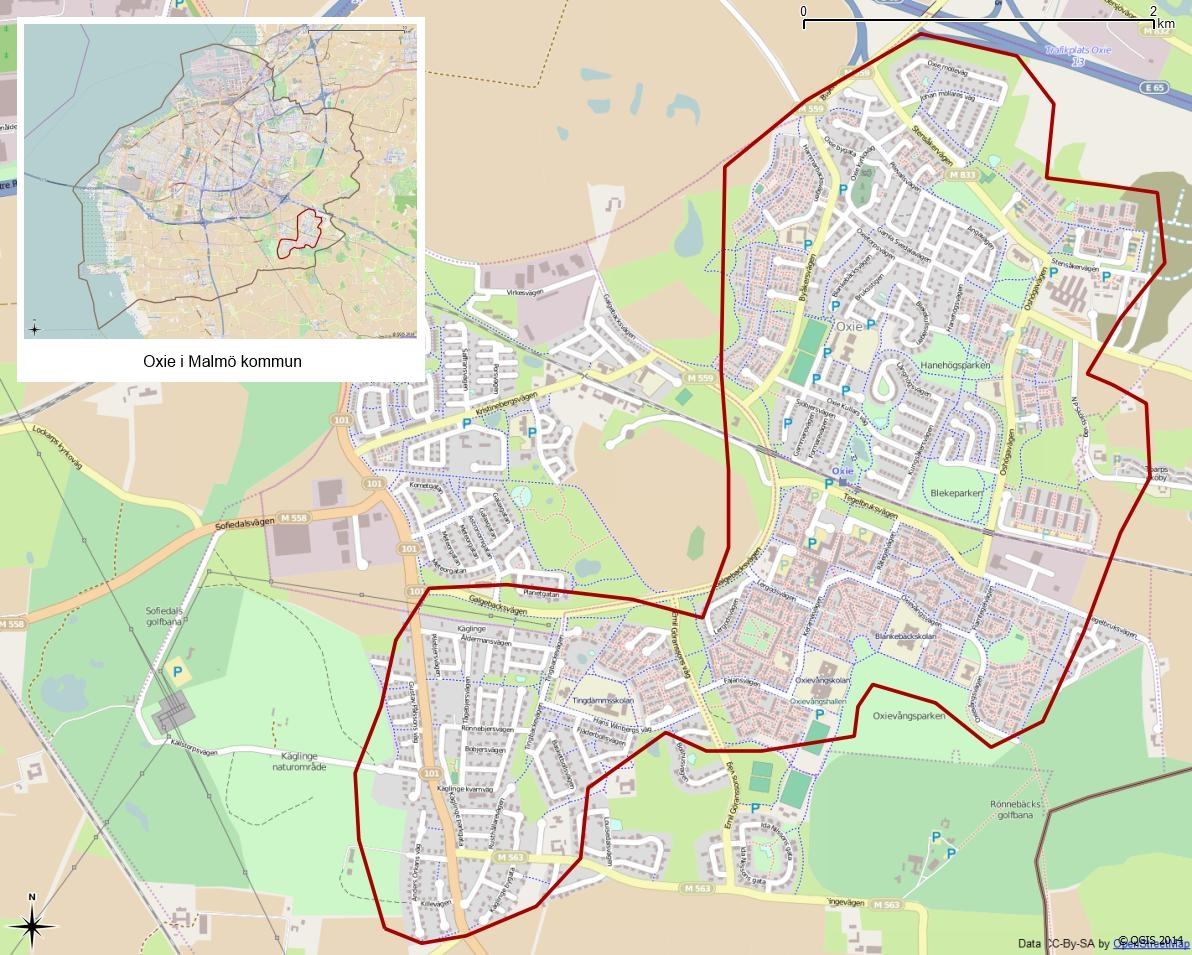 Tätorten Oxies gränser 1990 enligt Atlas över rikets indelningar 1992.